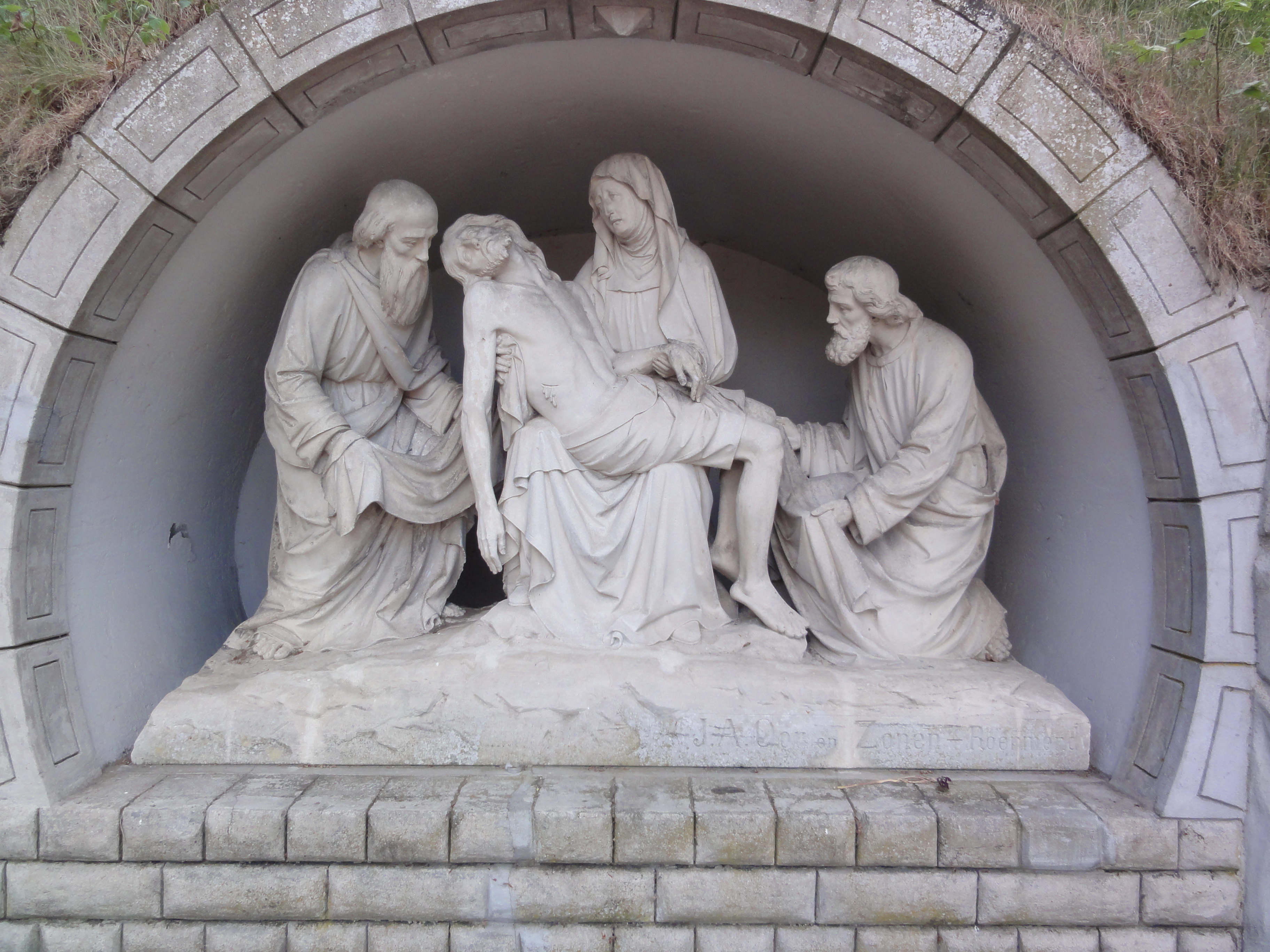 Gemert